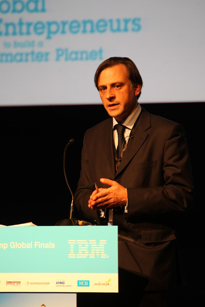 Dr Constantin Gurdgiev, Centre for Global Economic Development